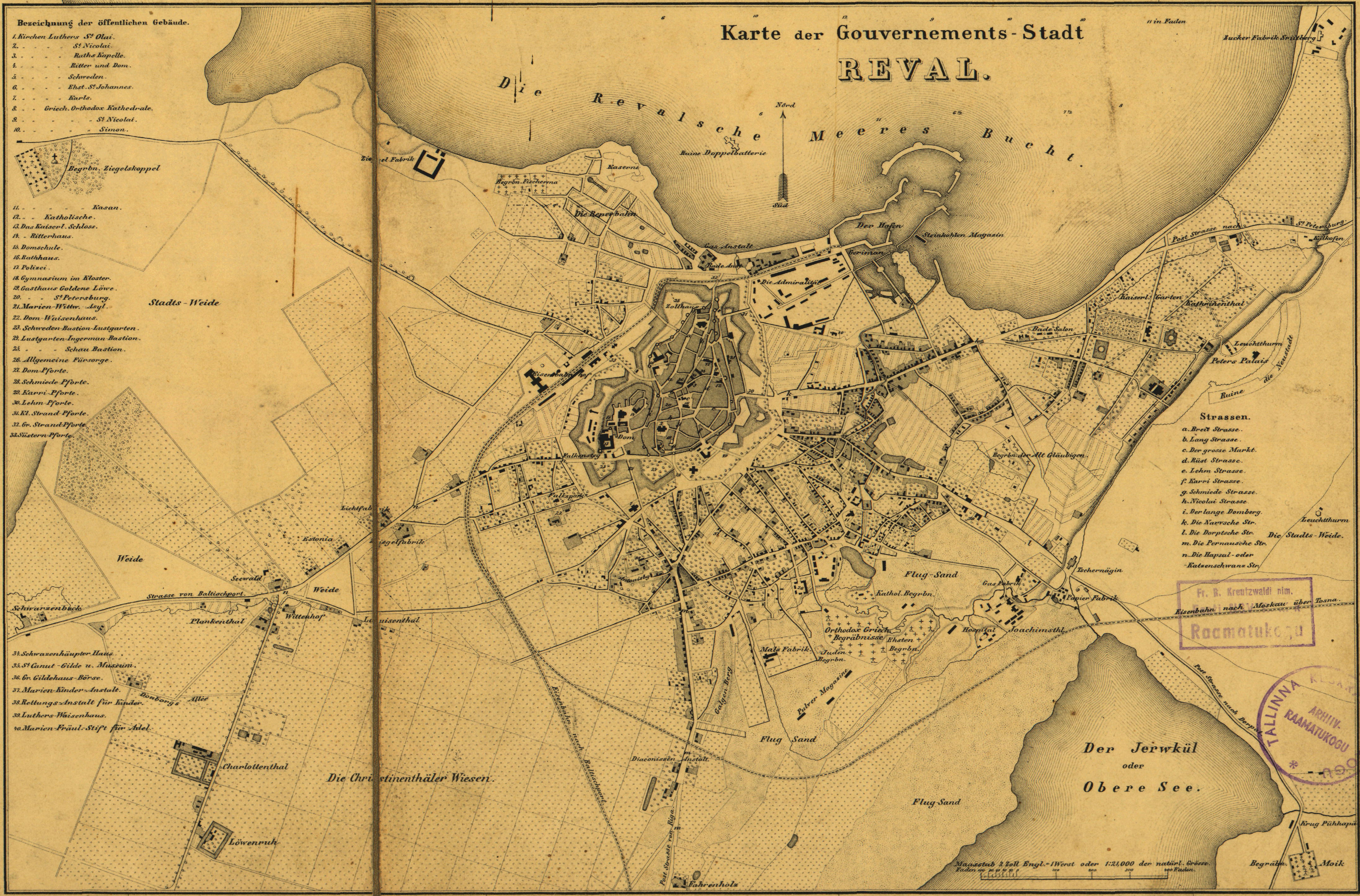 Tallinna linnaplaan, 1876